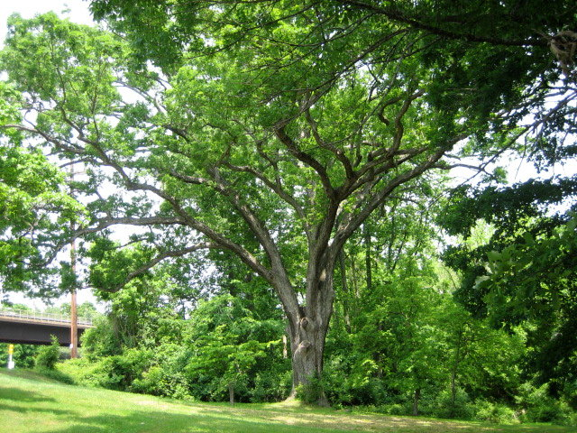 Linden Oak